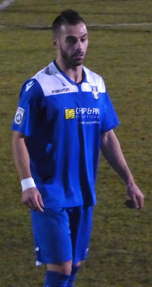 Nick Salapatas